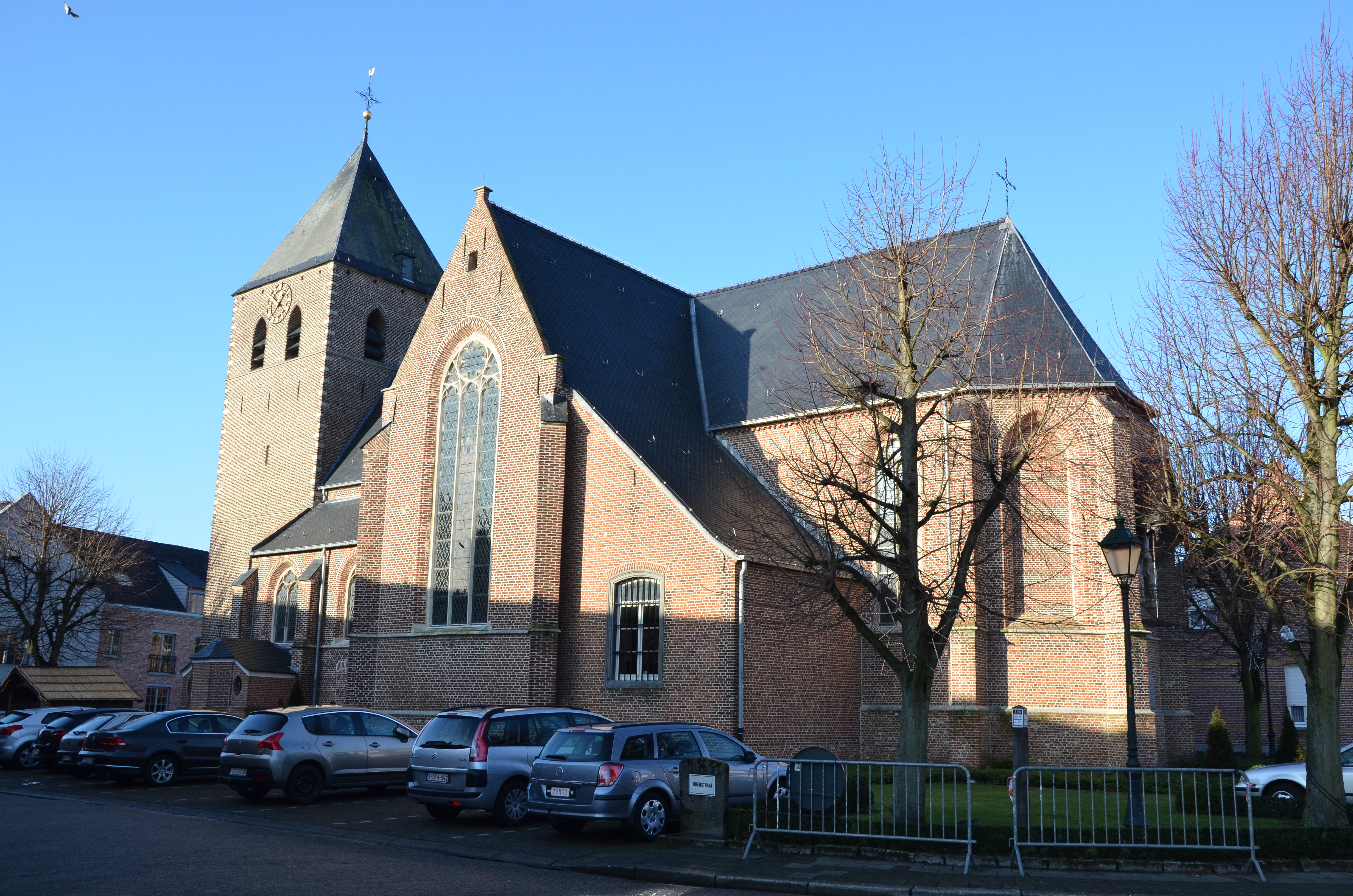 Sint-Pieter en Pauwelkerk, Pulle